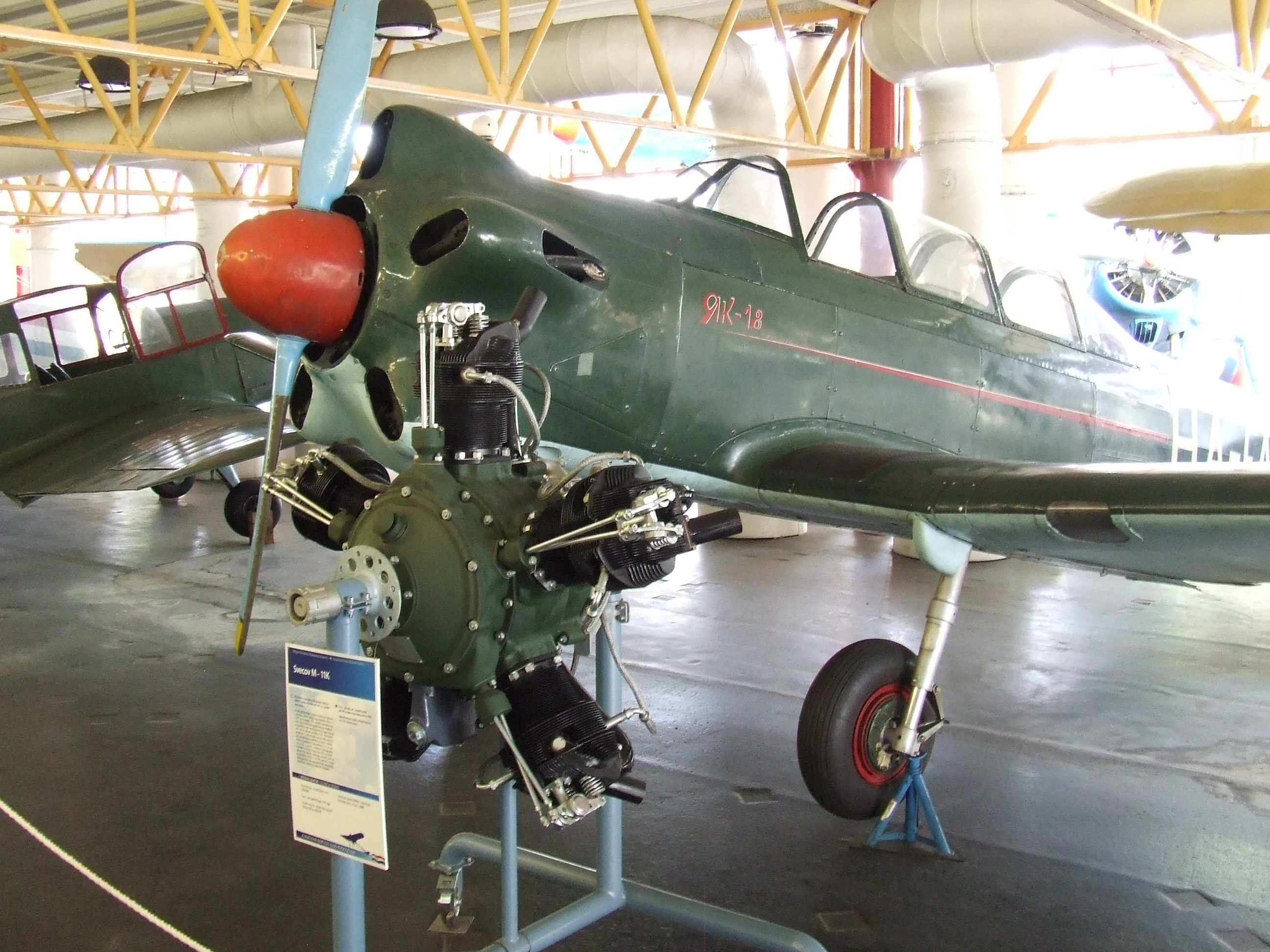 Petőfi Csarnok, Repüléstörténeti kiállítás, Svecov M-11K